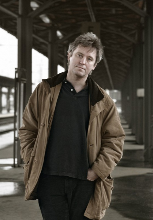 Háy János magyar író, költő, képzőművész.